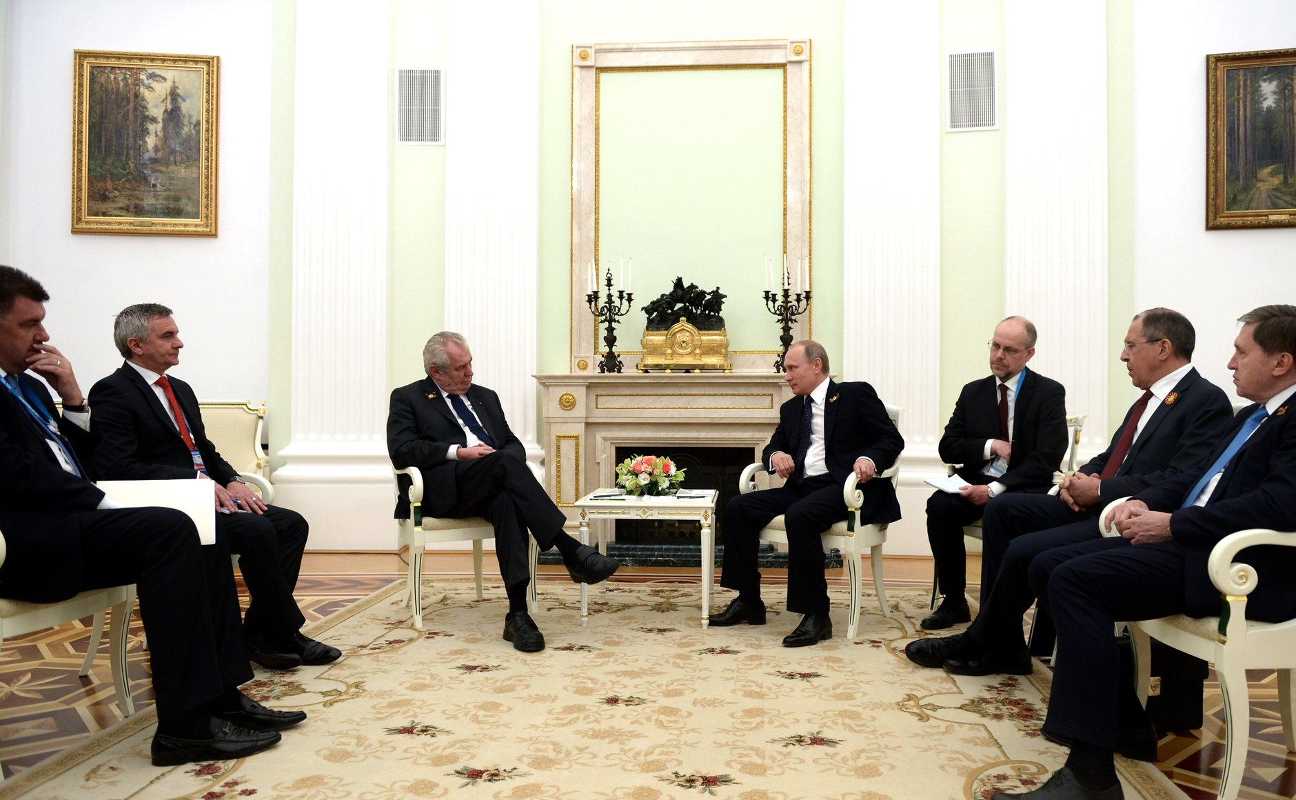 Встреча Владимира Путина с Президентом Чехии Милошем Земаном